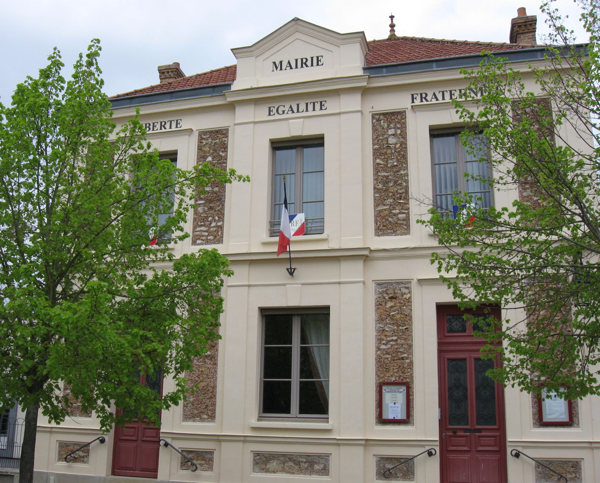 Mairie de Maincy. (Seine-et-Marne, région Île-de-France).